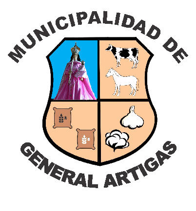 Nuevo Escudo